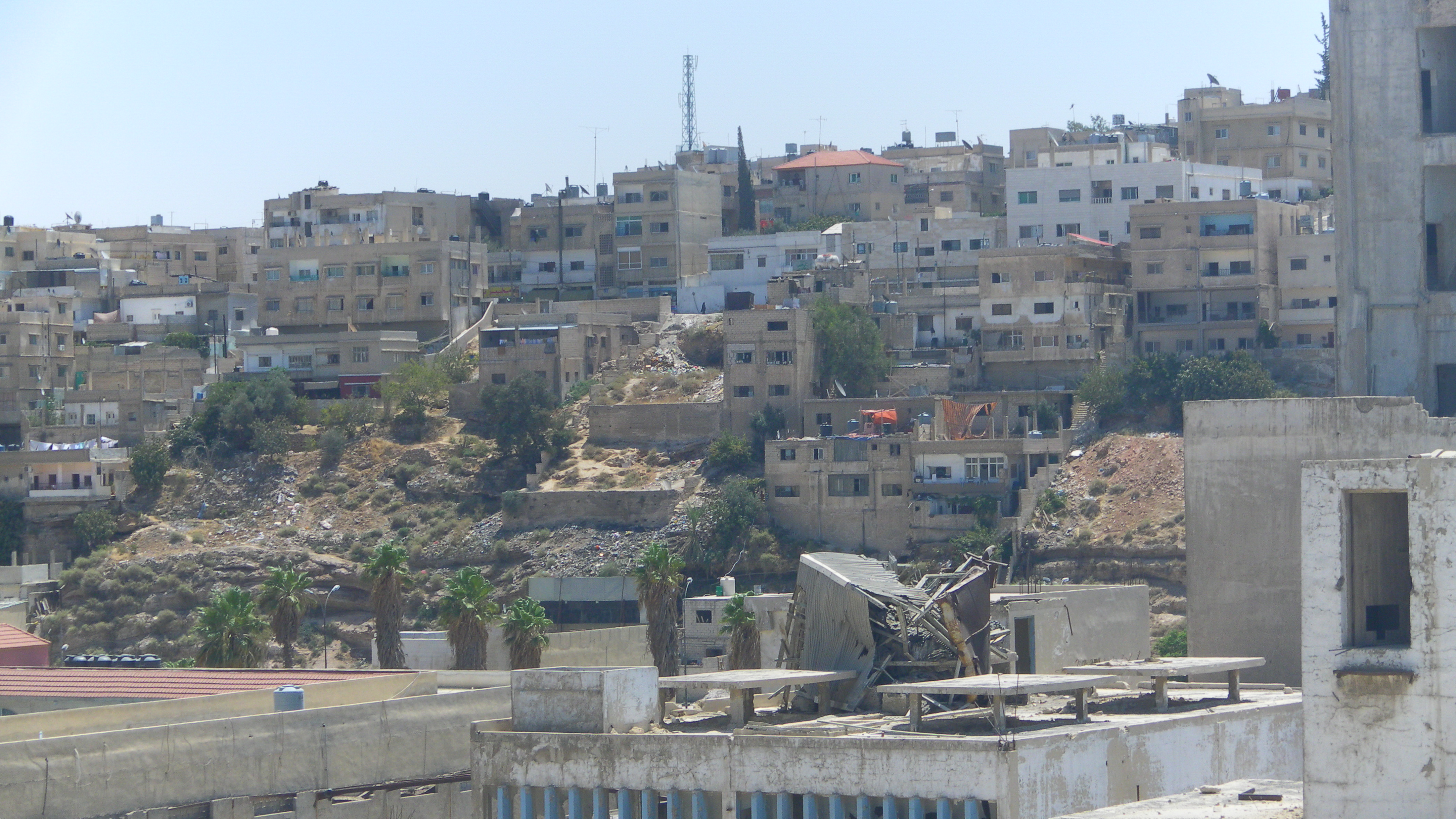 منظر من الجبل الجنوبي في الرصيفة, الزرقاء